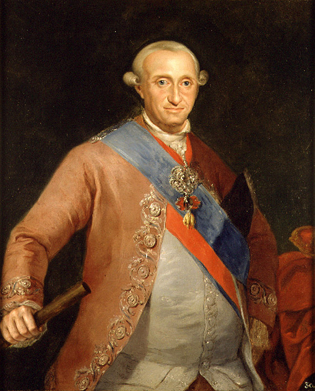 Retrato del rey Carlos IV de España (1748-1819), que fue hijo del rey Carlos III de España y de la reina María Amalia de Sajonia.